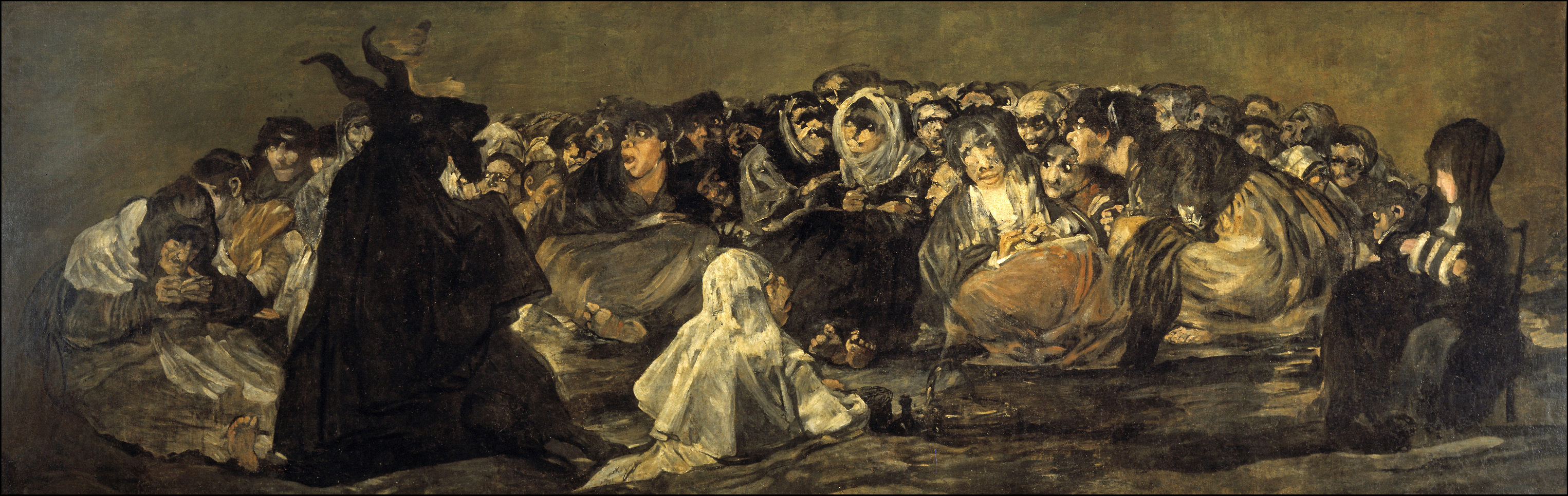 El Aquelarre